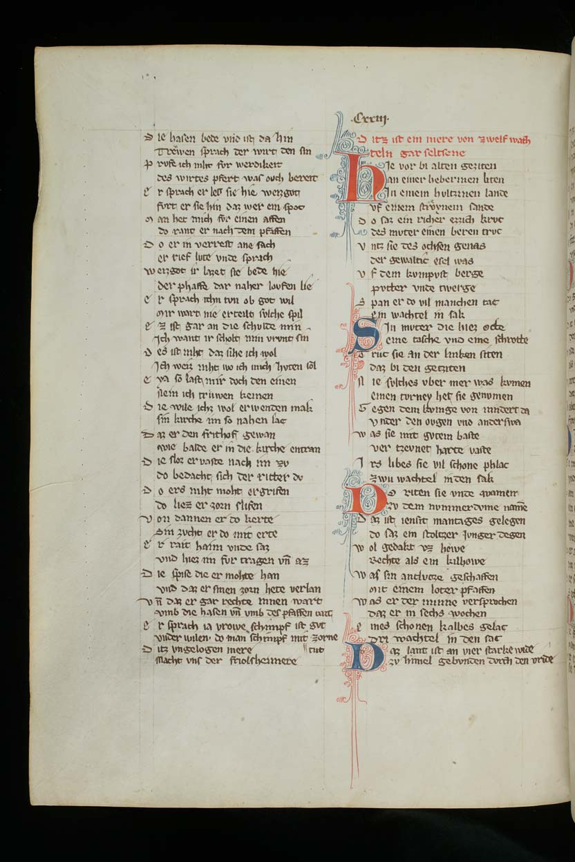 Anfang des "Wachtelmäre" im Cod. Bodmer 72, Handschriftentitel: Sammlung kleinerer mittelhochdeutscher Reimpaardichtungen (Kalocsa-Kodex), Blatt 253v